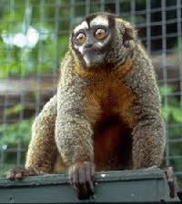 aotus